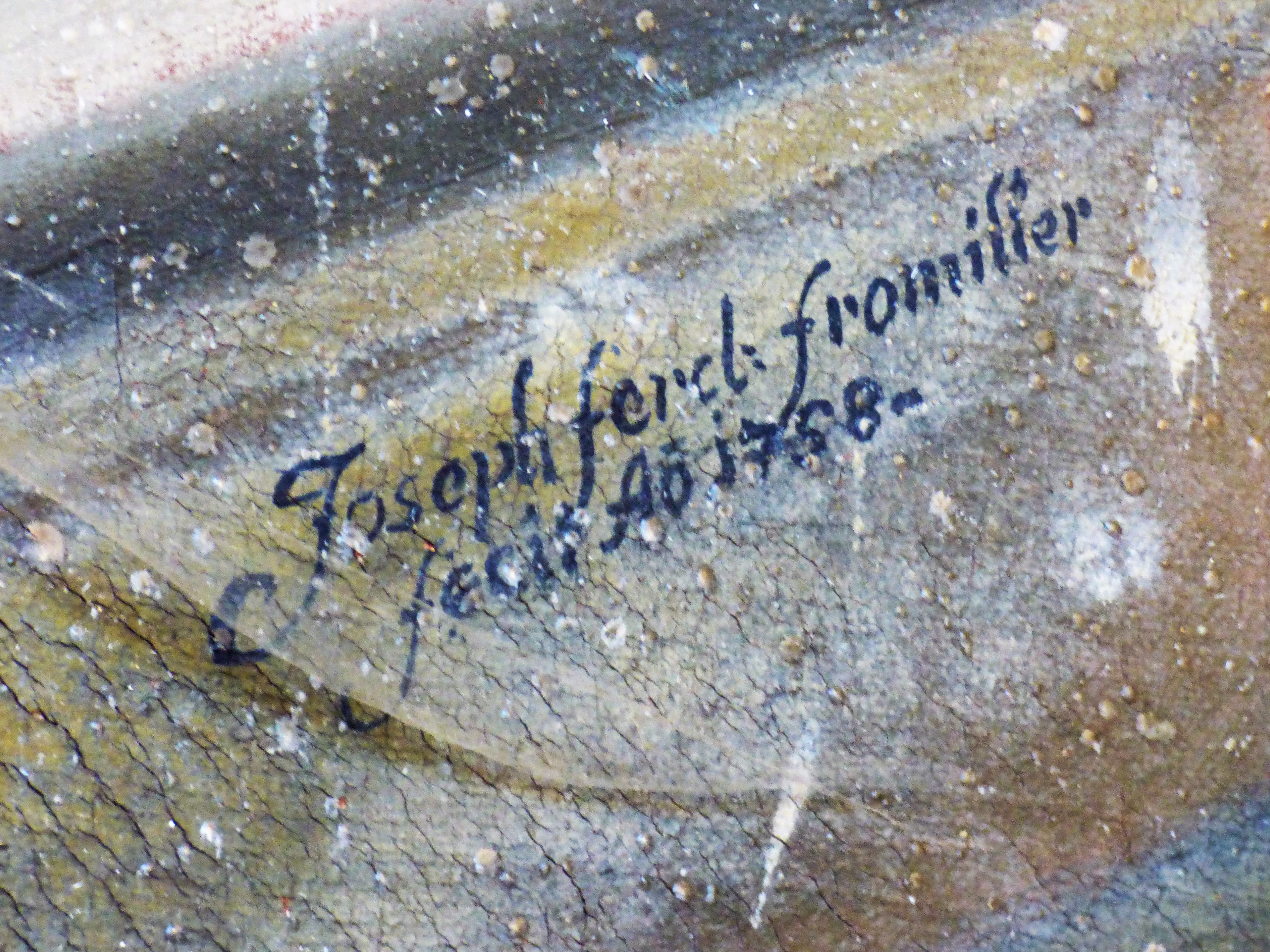 Pfarrkirche Heiligkreuz, Klösterle, Innerteuchen, Gemeinde Arriach, Kärnten: Signatur "Joseph Ferd. Fromiller", 1758, am rechten Seitenaltar Tag des Denkmals 2016, Kärnten: Programmpunkt Arriach - Klösterle Dieses Bild wurde anlässlich des österreichischen Tags des Denkmals 2016 in Kärnten eingereicht.